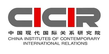 Эмблема КАСМО